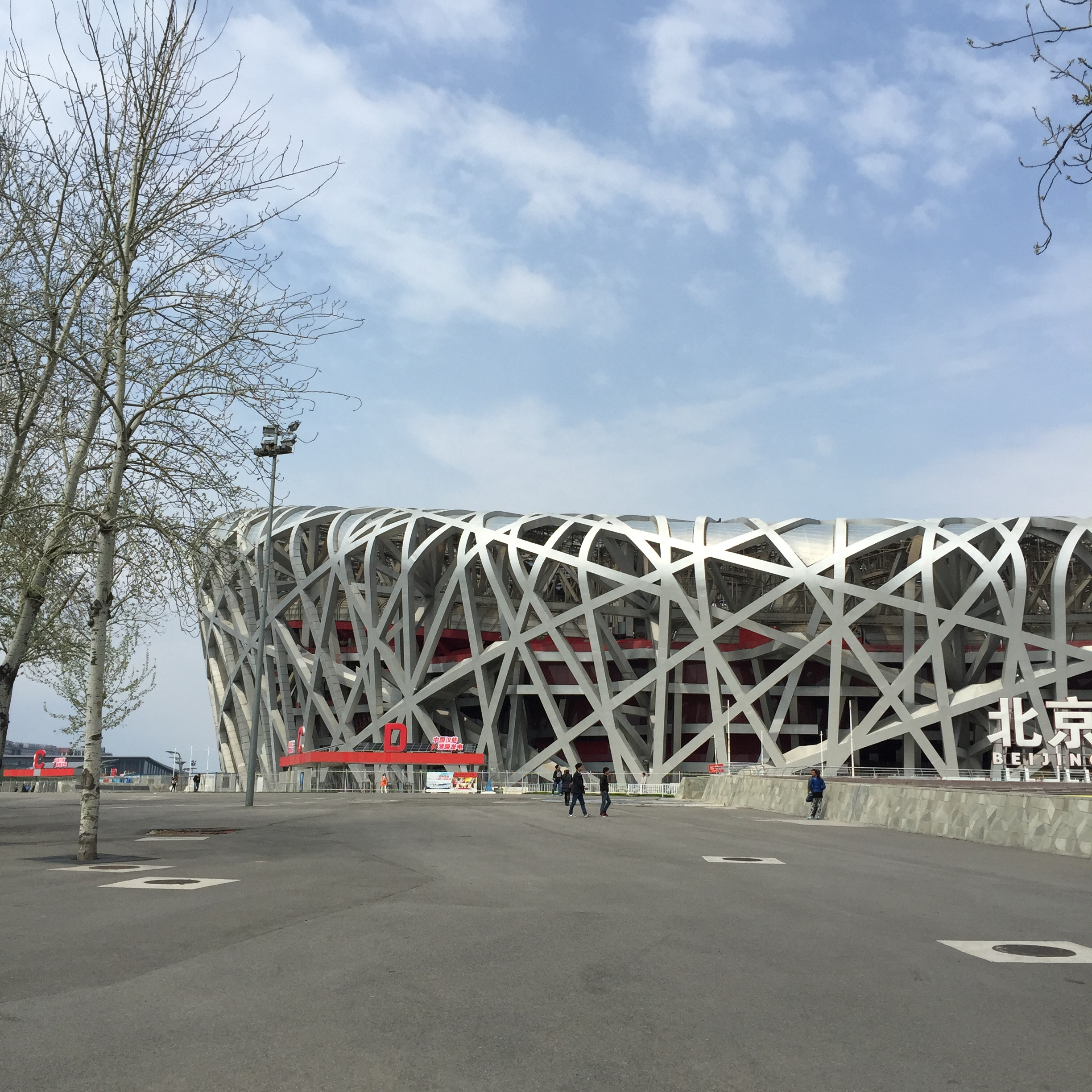 Chaoyang, Beijing, China